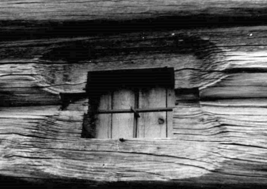 Традиционное волоковое окно. Церковь Преображения Господня в с. Ижма (1679 г.)